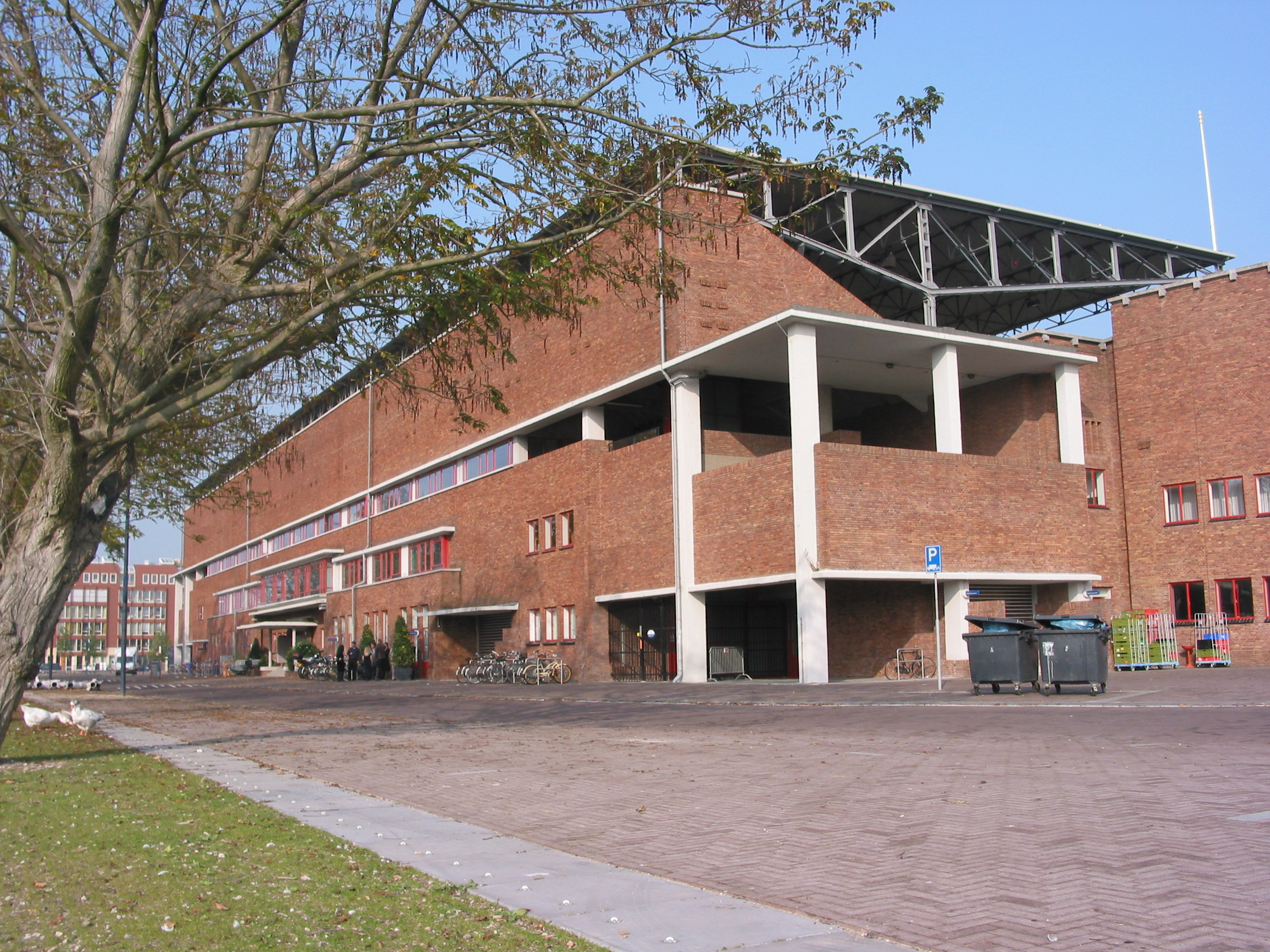 Olympisch stadion Amsterdam: achterzijde eretribune.